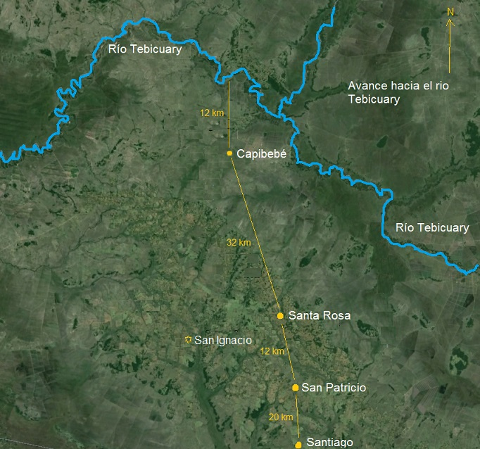 Teatro de operaciones expedición militar de la junta de Buenos Aires contra la Provincia del Paraguay 1810-1811